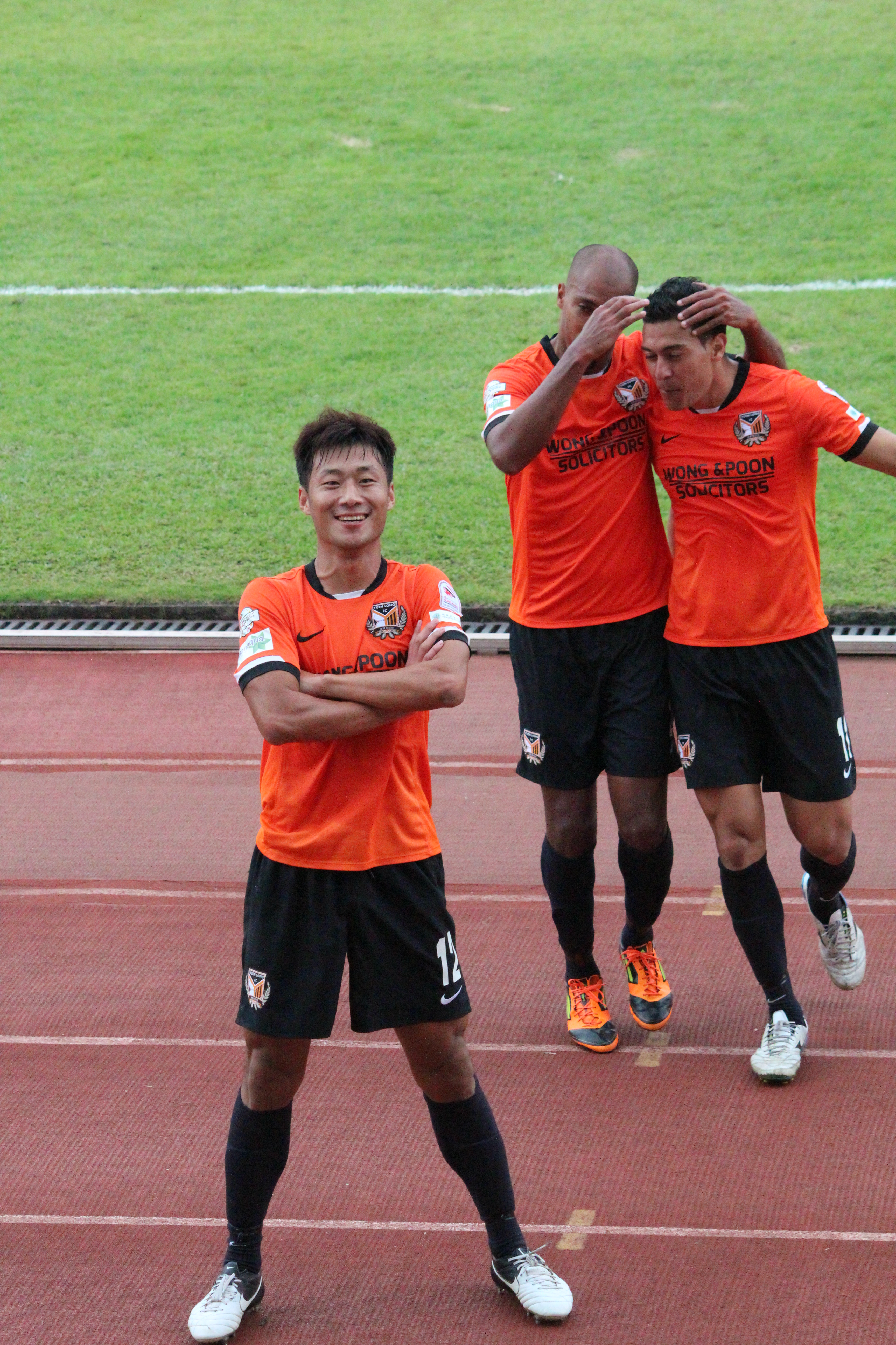 三月十四日元洋再次在香港超級聯賽中對壘黃大仙入球後奔向觀眾看台接受球迷祝賀